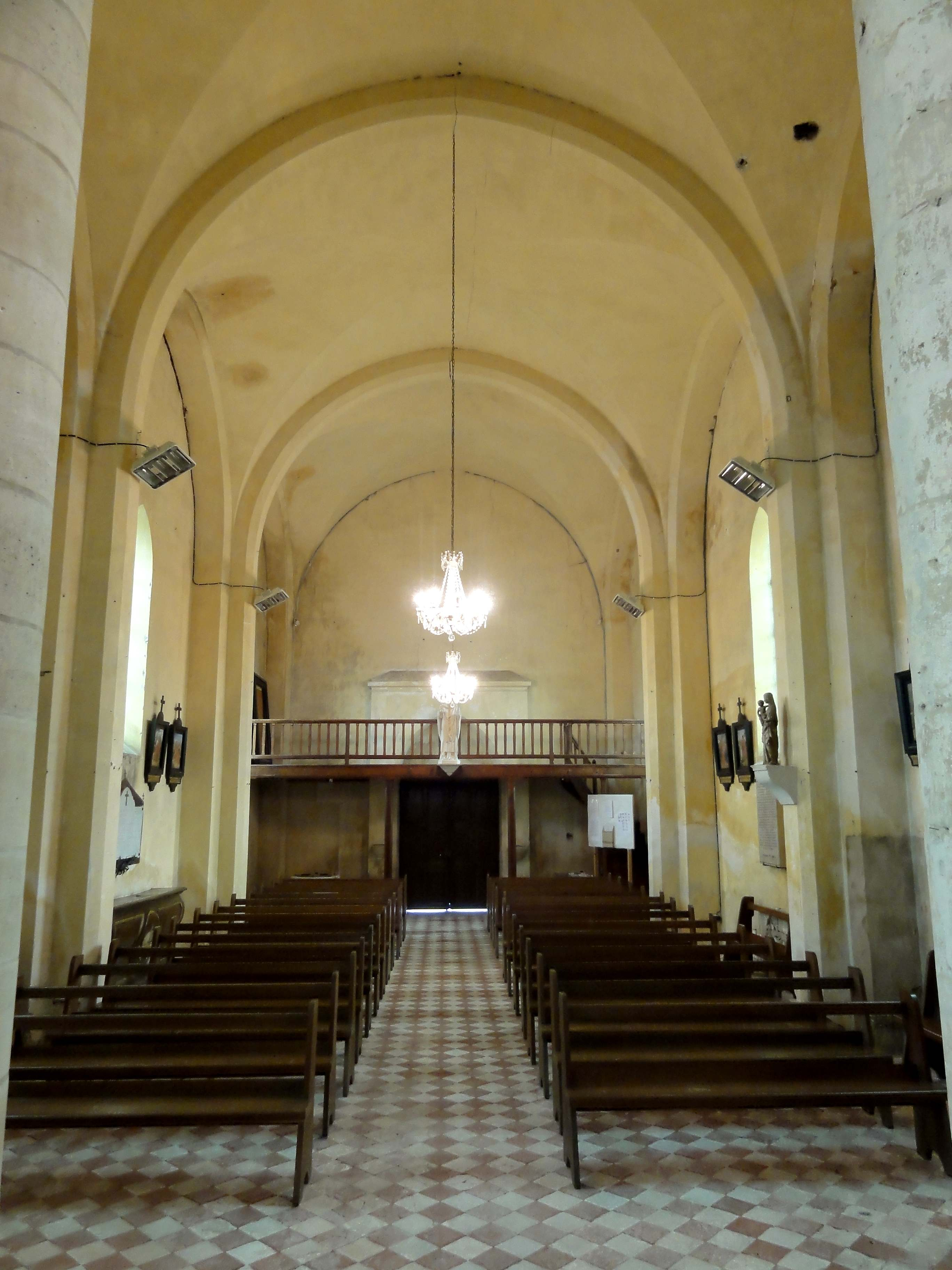 Intérieur de l'église (voir titre).